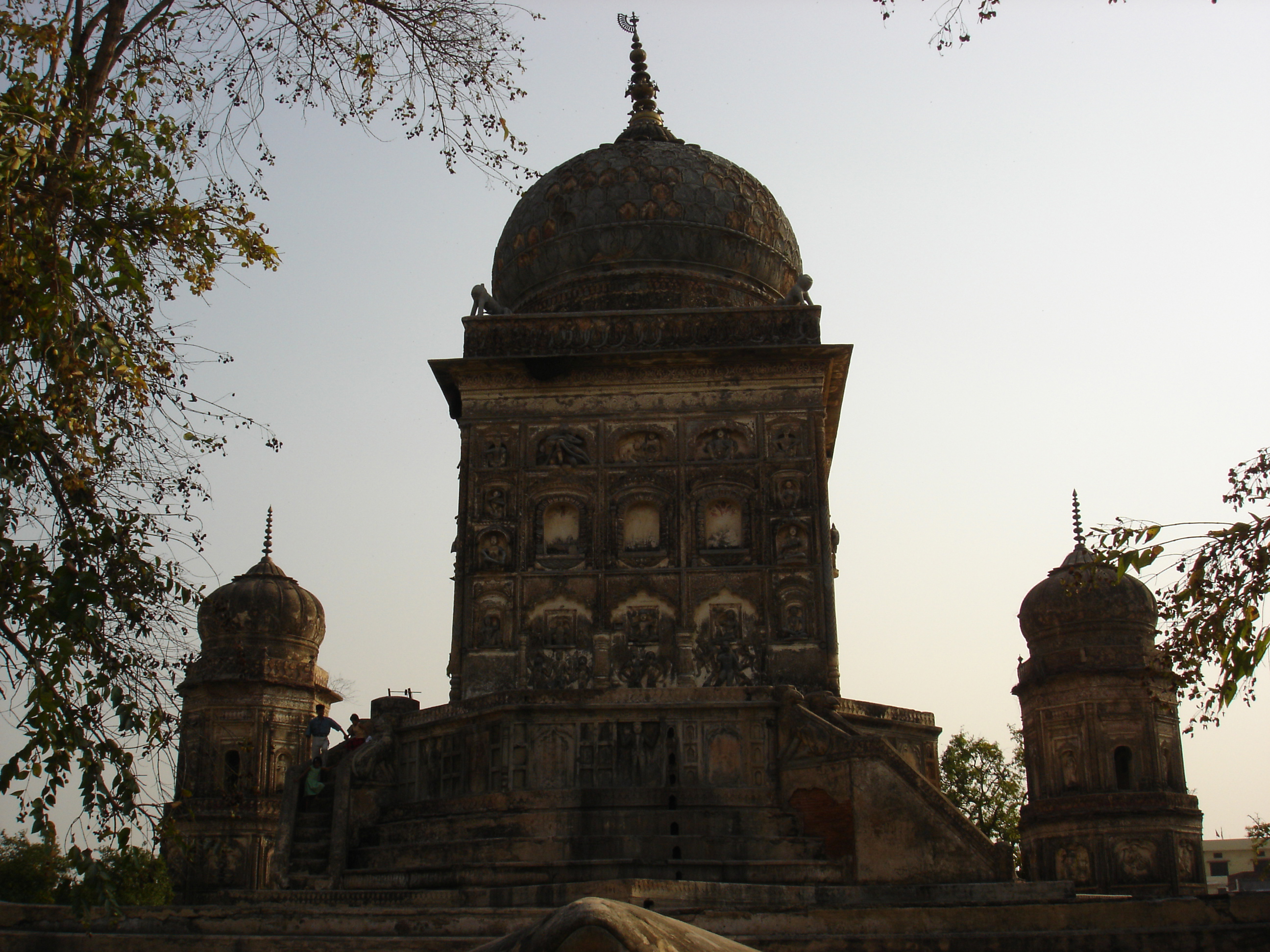 frog temple oel